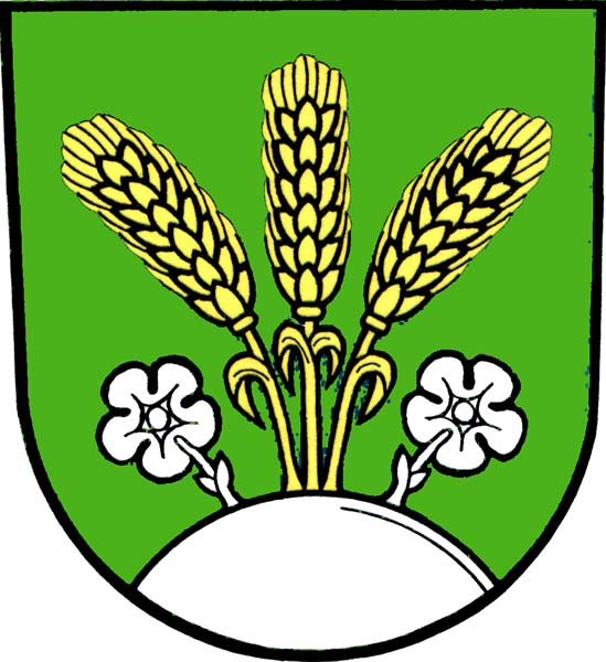 Znak obce Velká Štáhle